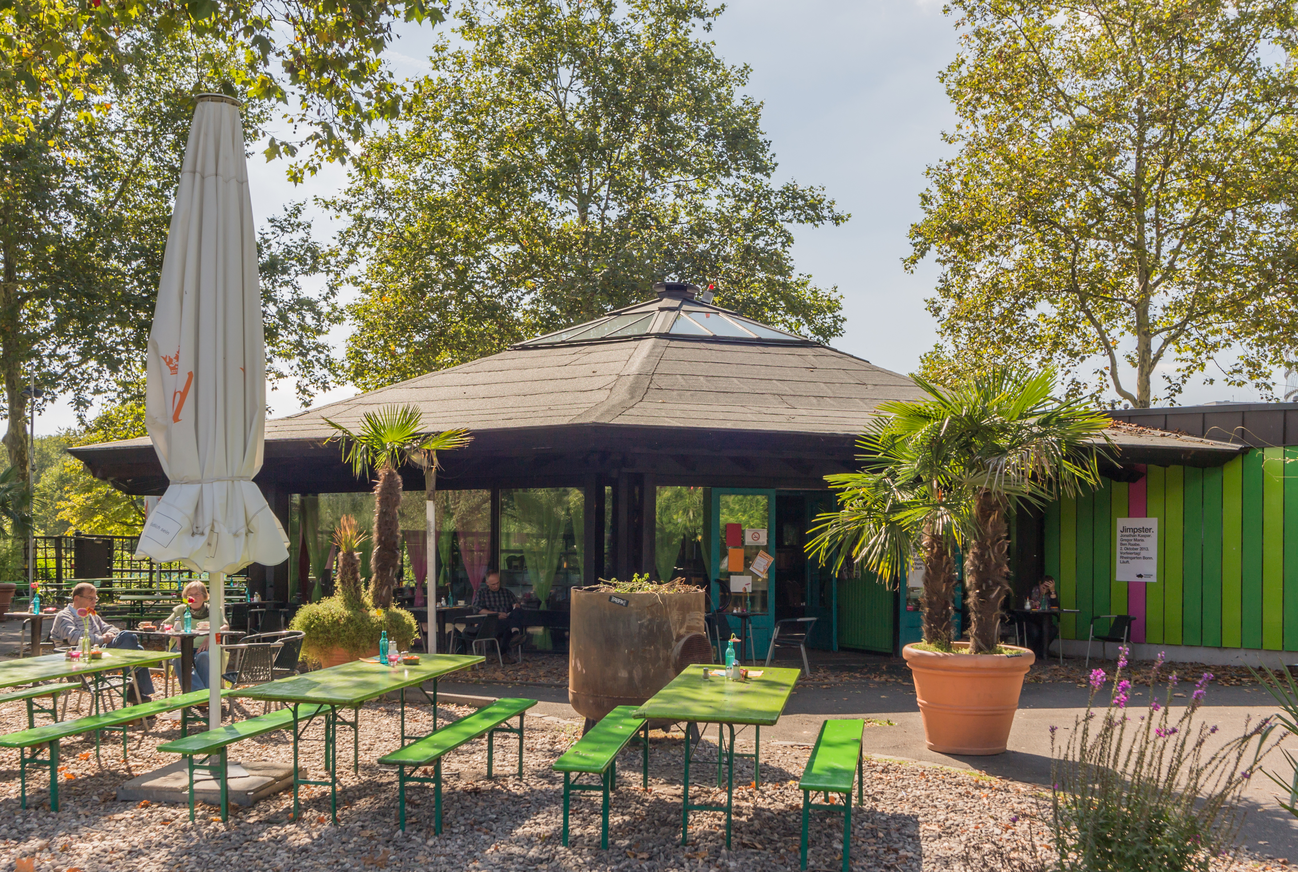 Restaurant and beer garden "Rheingarten", Rheinaue, Charles-de-Gaulle-Straße 53, Bonn, district Gronau